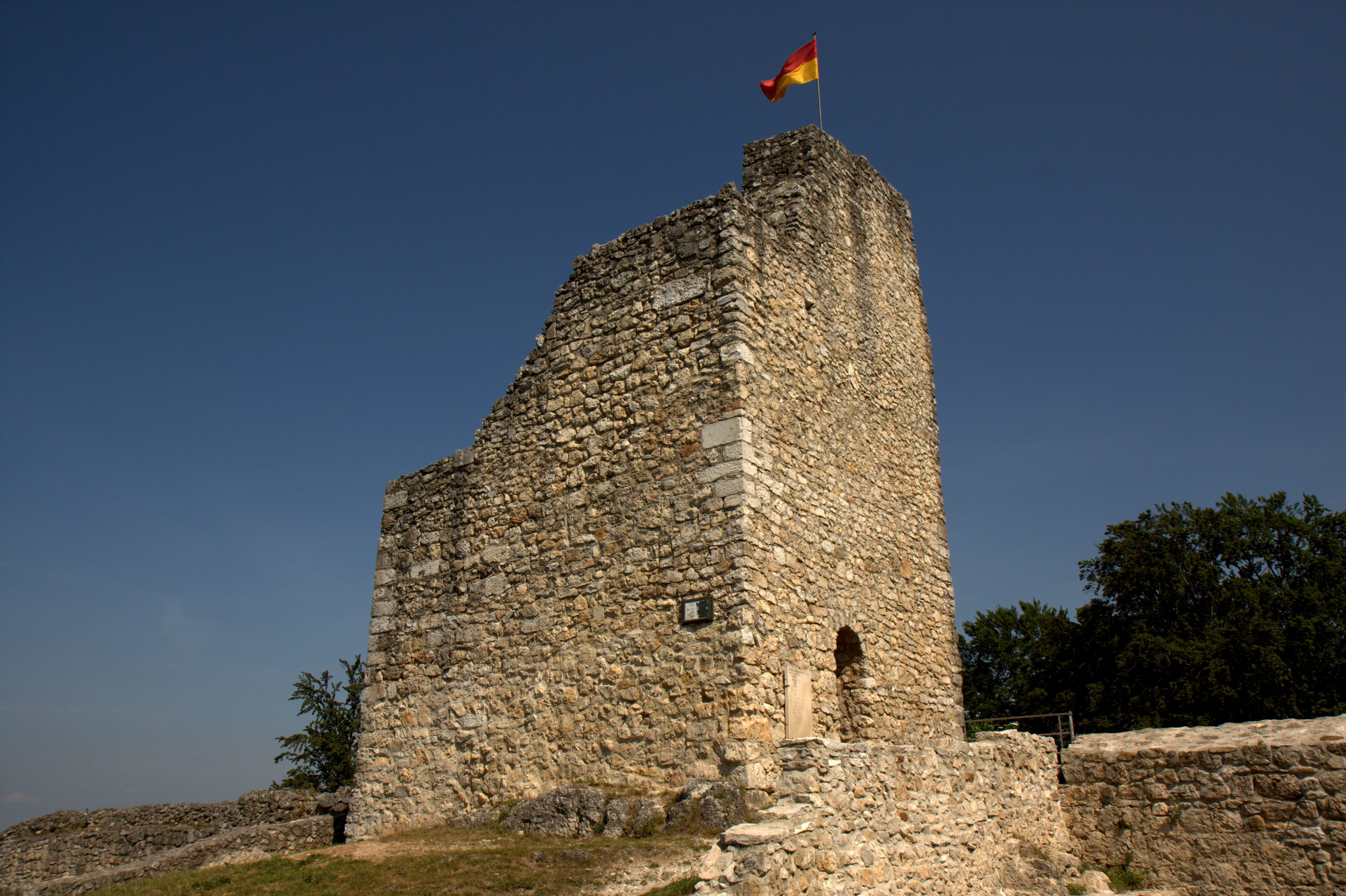 Burgruine Velburg - Ansicht der südostecke des Bergfriedes